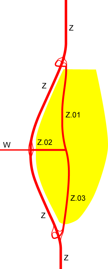 Grenvägsmönster. Stor väg passerar tätort och har grenvägar in i denna. Anledningen till att "västra infarten" här heter Z.02 i stället för att räknas som en del av W bör bero på att W inte har samma status som Z (riks- eller Europaväg) och att man velat ha med "västra infarten" i riksvägsbudgeten etc.